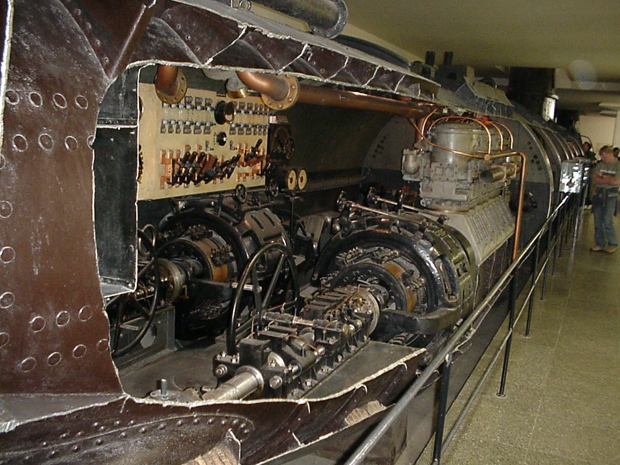 SM U-1. Fotografiert von Schoringer im April 2003 im Deutschen Museum in München. Leider ist das U-Boot im Museum so umbaut, dass keine vernünftige Gesamtaufnahme möglich ist. Es handelt sich um eine Ansicht vom Heck her. Die schwarzen liegenden „Zylinder“ sind die Elektromotoren. Der hellgraue Block davor ist der Steuerbordpetroleummotor. Der Backbordmotor wurde ausgebaut.